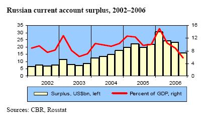 Russian_current_surplus_2007